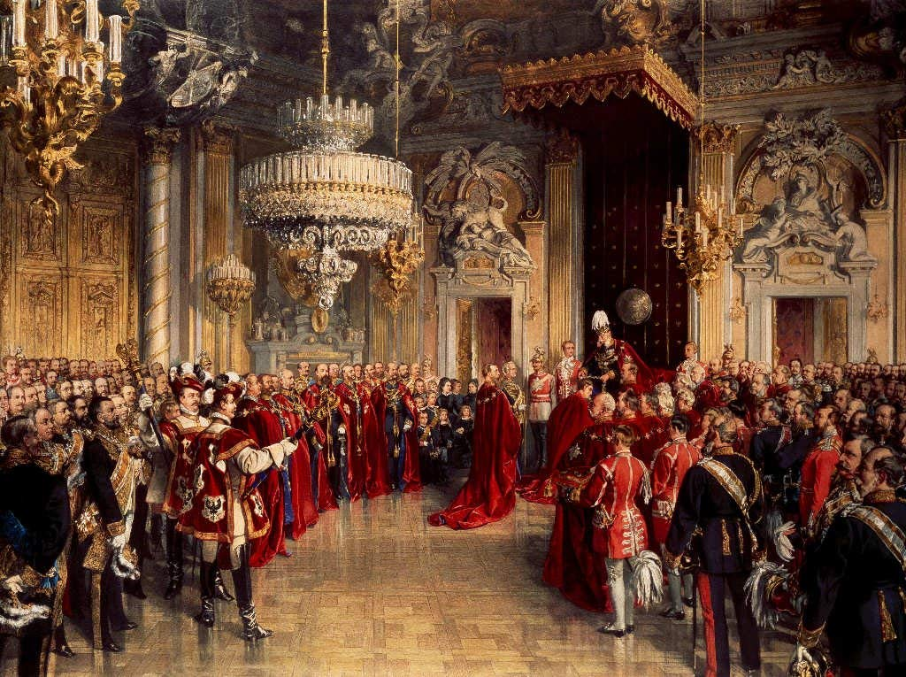 Investitur des Prinzen Wilhelm II in Orden vom Schwarzen Adler